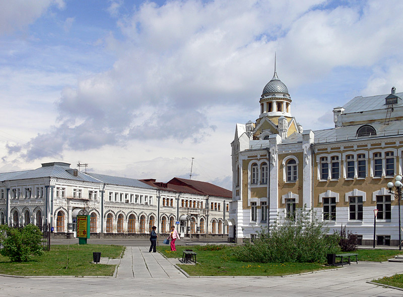 Biysk. Sovetskaya Str. Бийск. улица Советская.